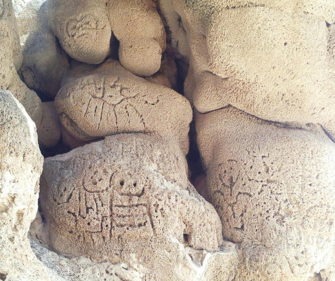 Las caritas de los Indios en el Parque Nacional Lago Enriquillo (República Dominicana).